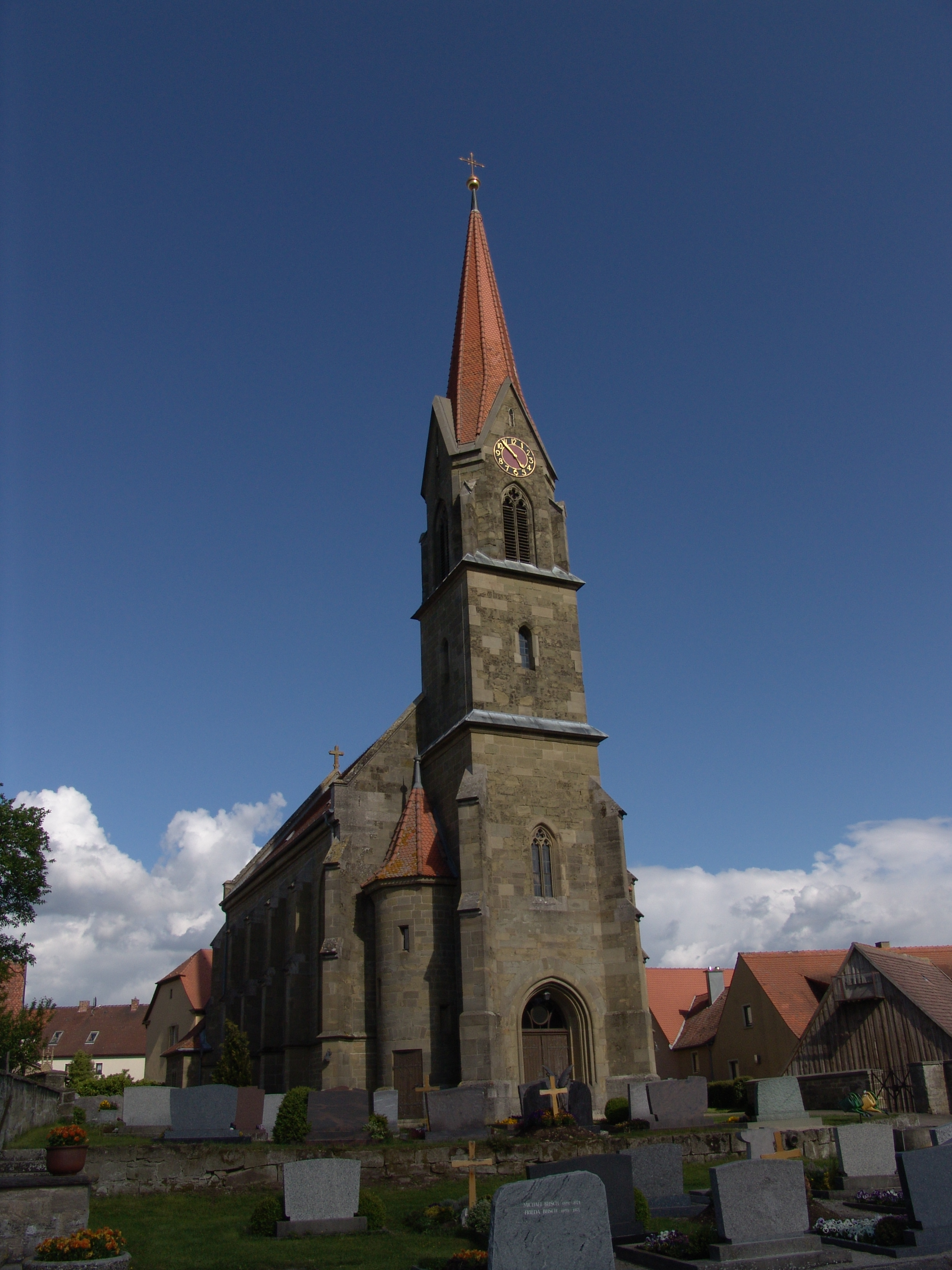 Evangelische Kirche